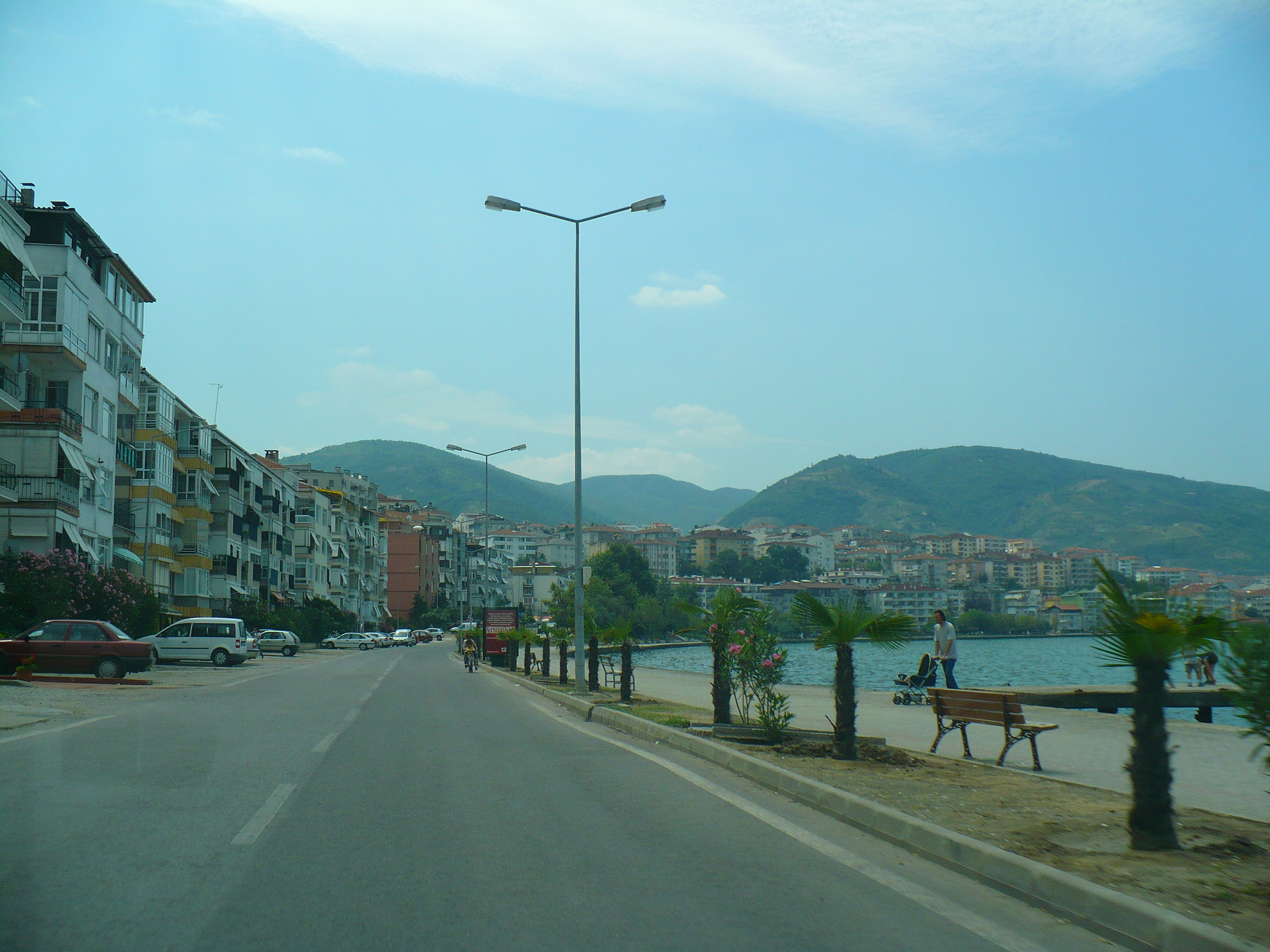 Gölcük'den görüntüler